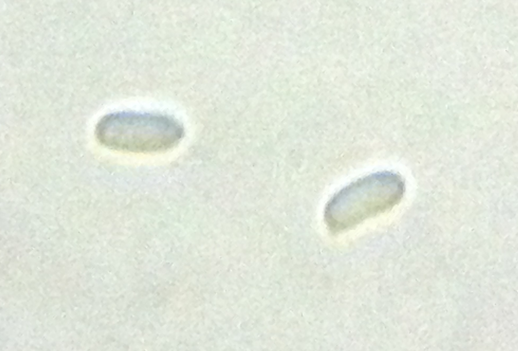 Esporas de Plateado de los frutales, Chondrostereum purpureum, colectadas en huerto de almendros